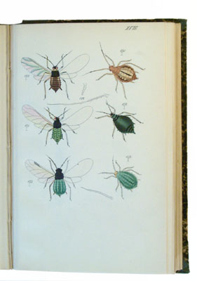 Plate from Die Pflanzenläuse, Aphiden. Lotzbeck, Nürnberg 1857.